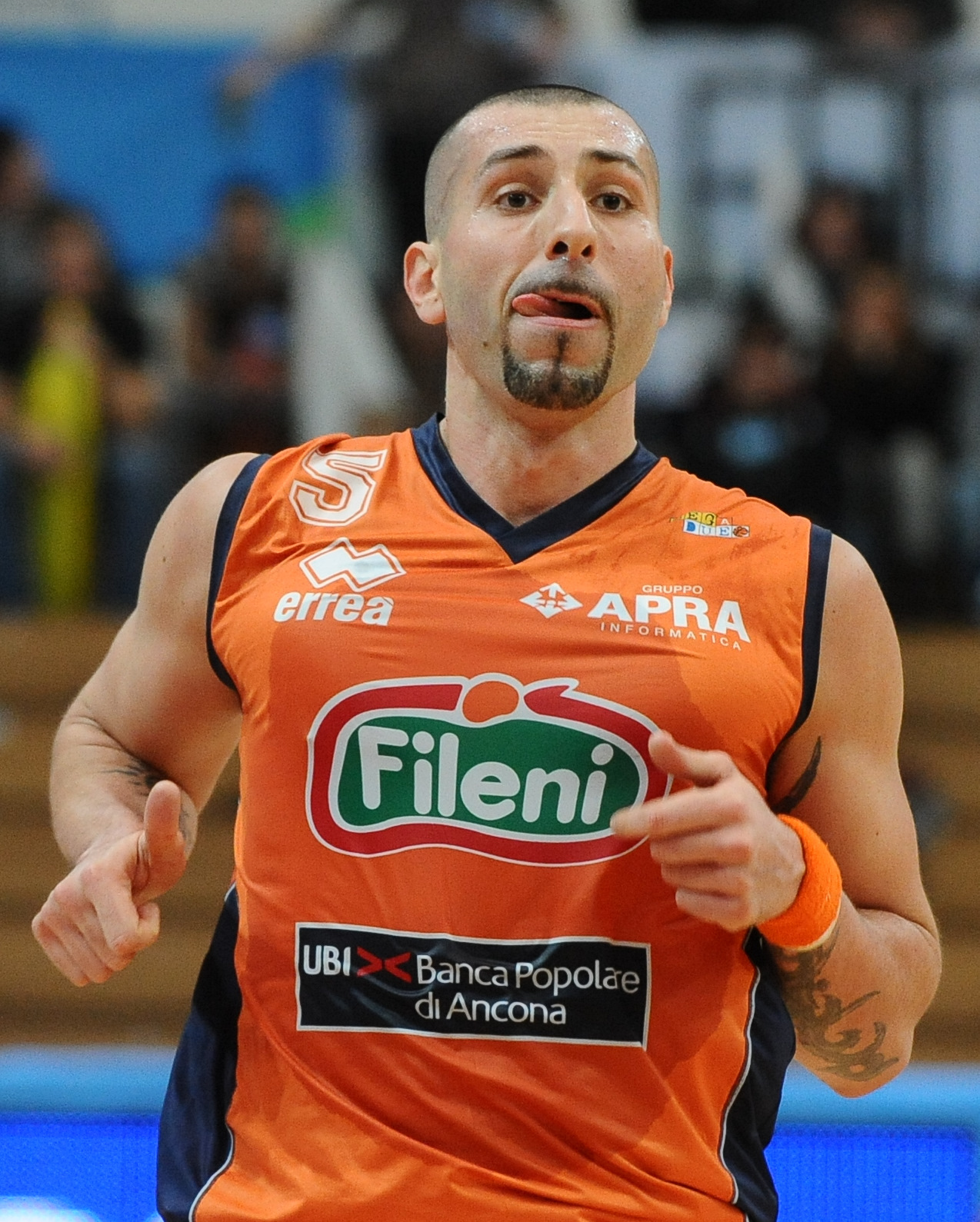 Michele Maggioli con la maglia dell'Aurora Basket Jesi al PalaTrento in una partita di Legadue contro l'Aquila Basket Trento.